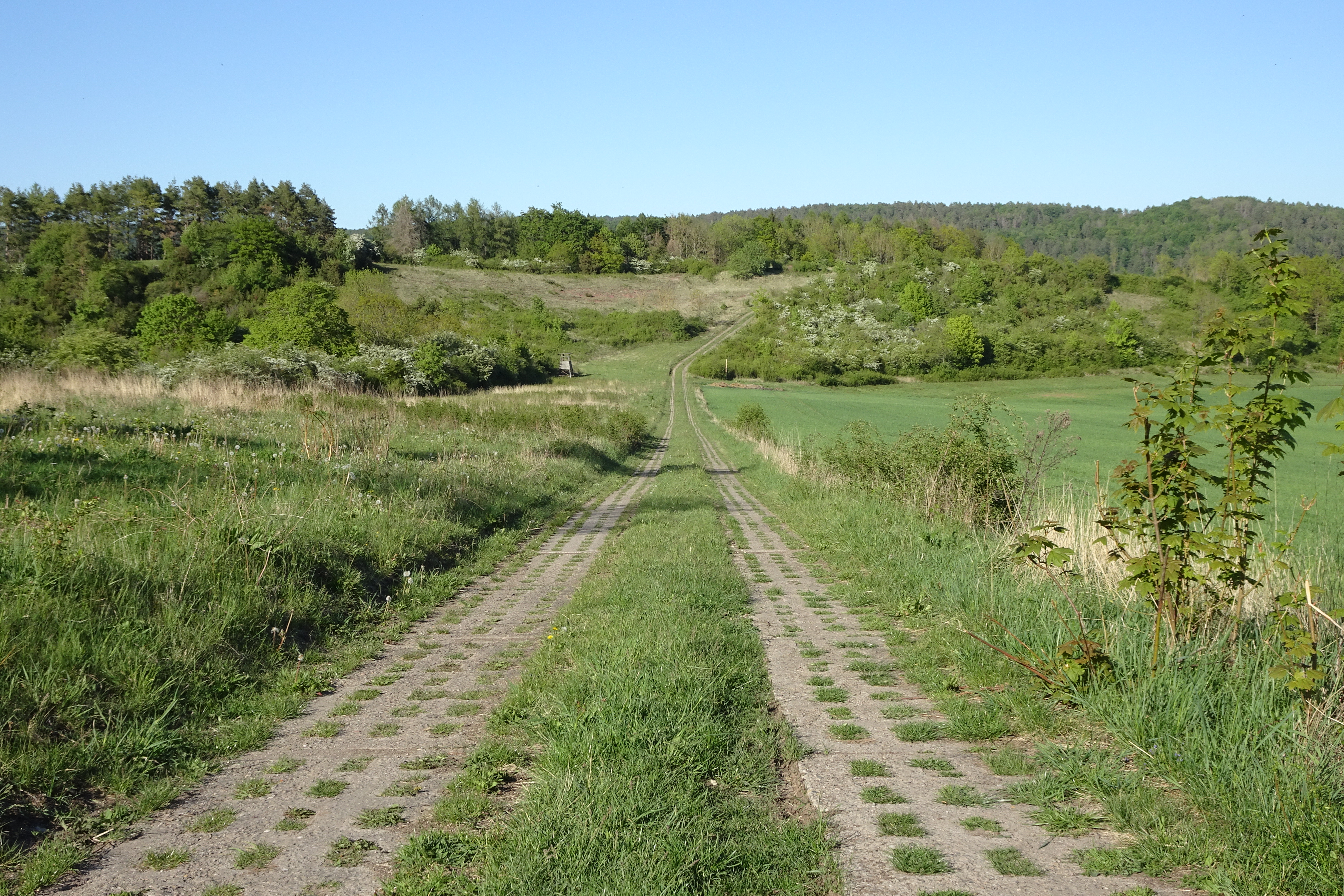 In der Grenzregion treffen am „Grünen Band“ der thüringische Naturpark Eichsfeld-Hainich-Werratal und der hessische Geo-Naturpark Frau-Holle-Land aufeinander.